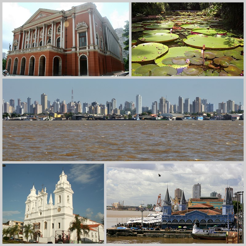 Montagem de fotos da cidade de Belém, Brasil